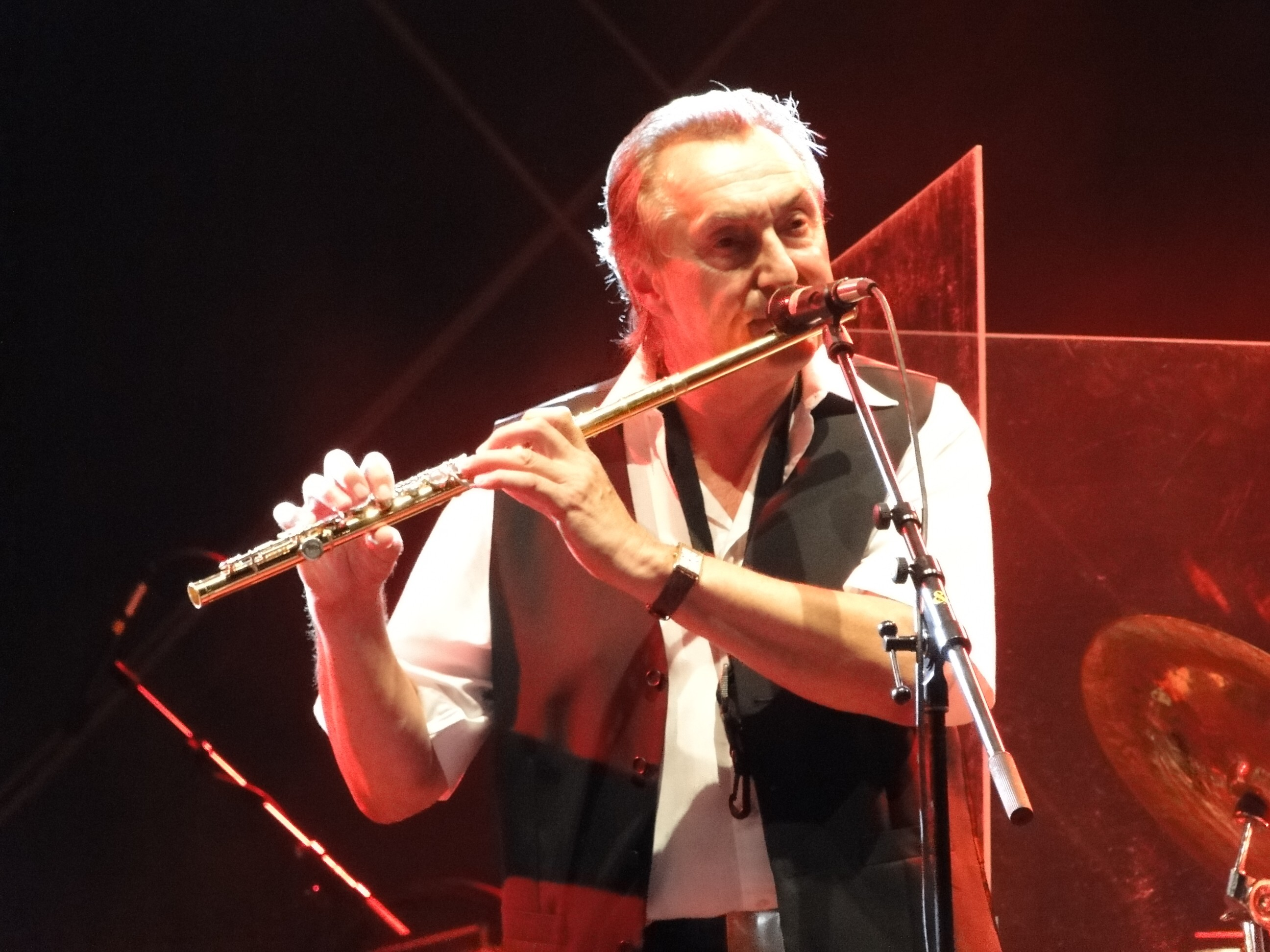 Bernd Aust von der Band electra auf einem Konzert im August 2009